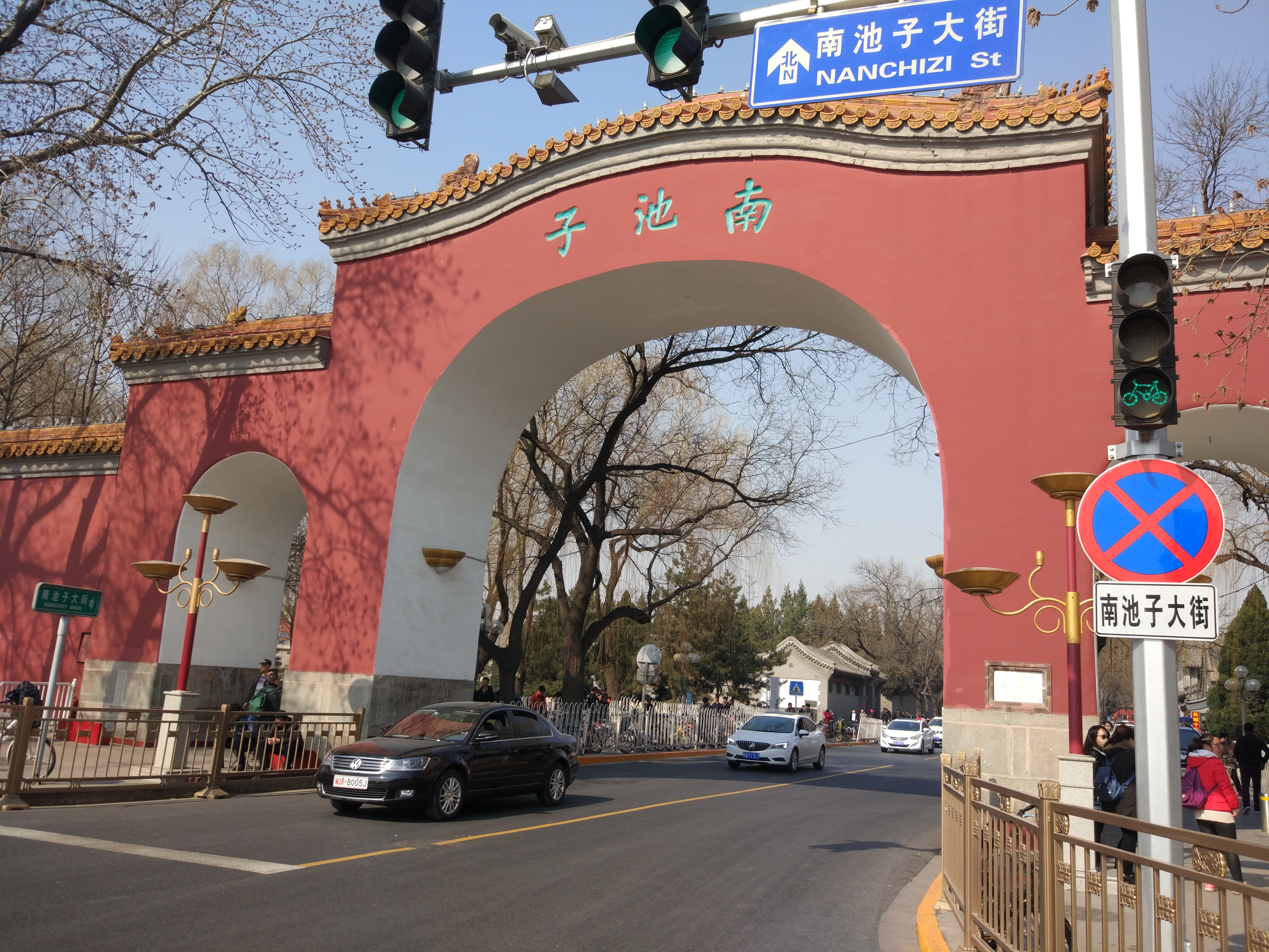 2017年3月摄于南池子大街南门，可用于条目南池子大街